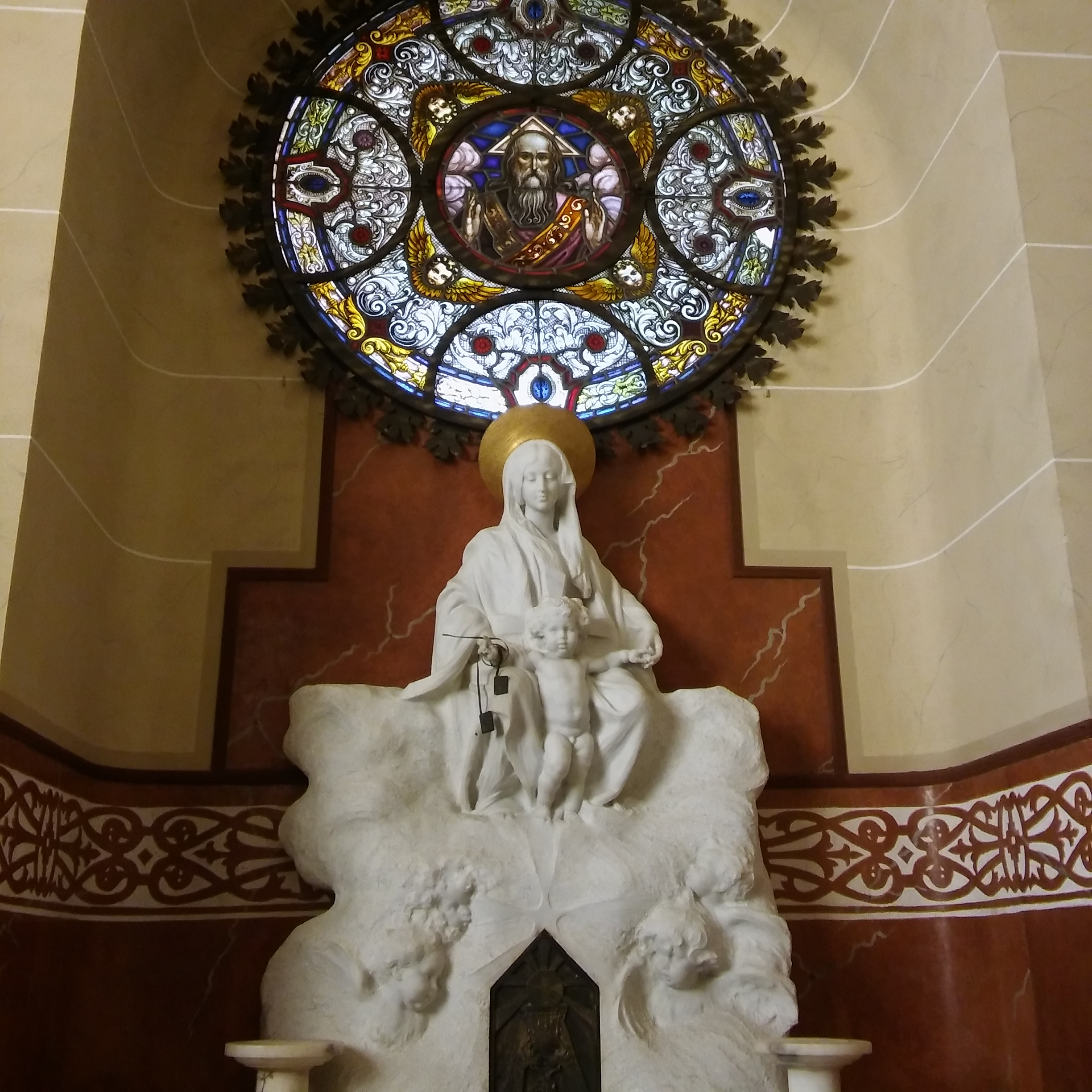 Pared lateral de la capilla de Termens. La vidriera representa a Dios Padre y el relieve de la parte inferior, que contiene el Sagrario, presenta la imagen de la Virgen del Carmen con el Niño.